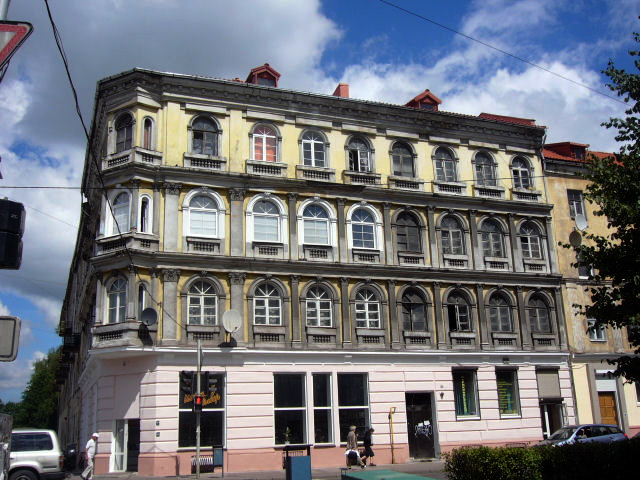 Здание на пересечении улиц Фрунзе и Грига в Калининграде